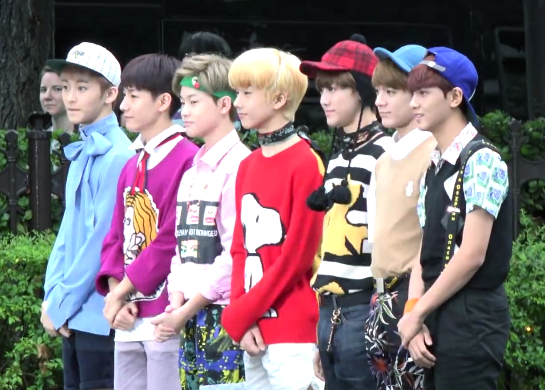 2016년 8월 26일 뮤직뱅크에서 NCT DREAM